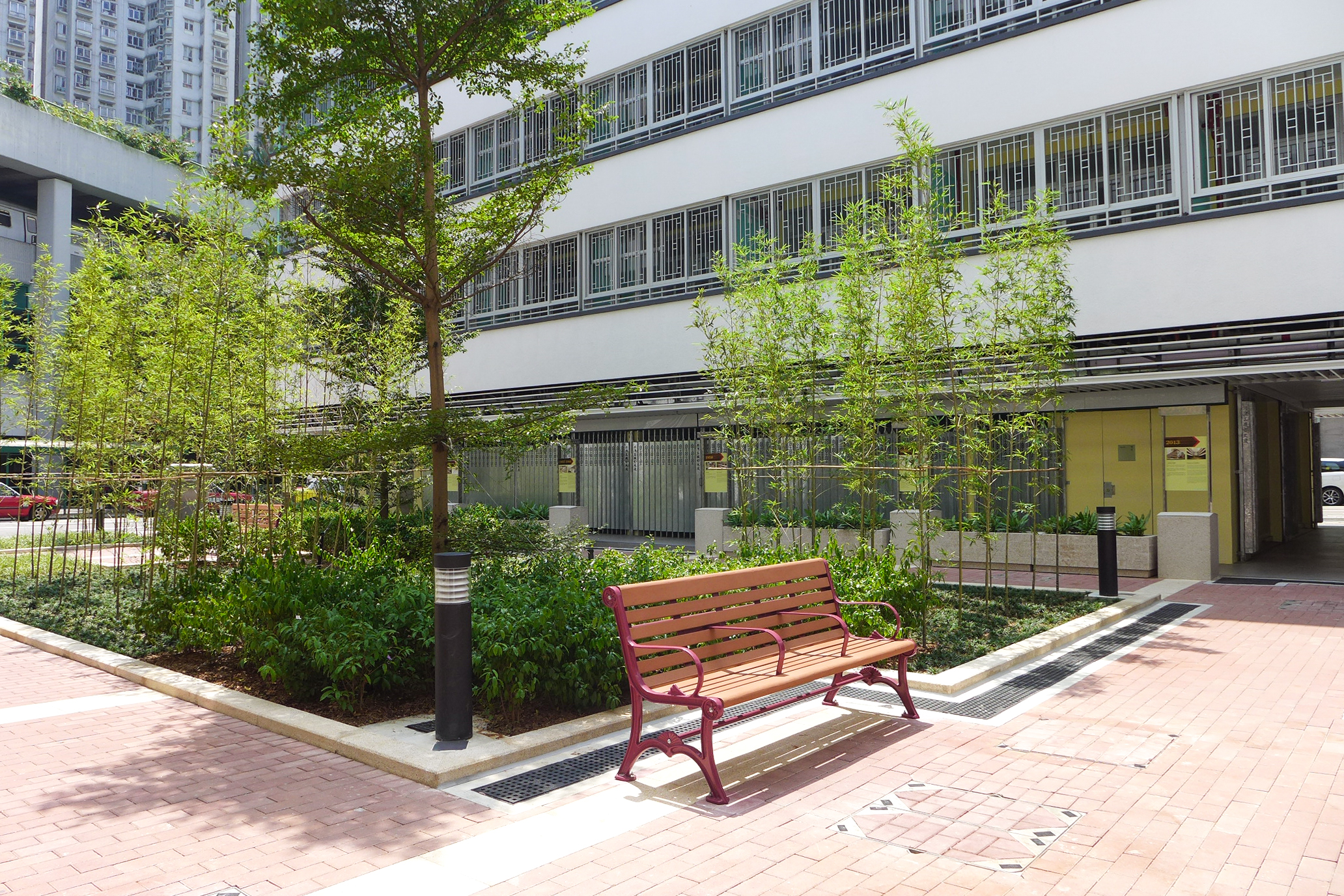 Wah Ha Estate